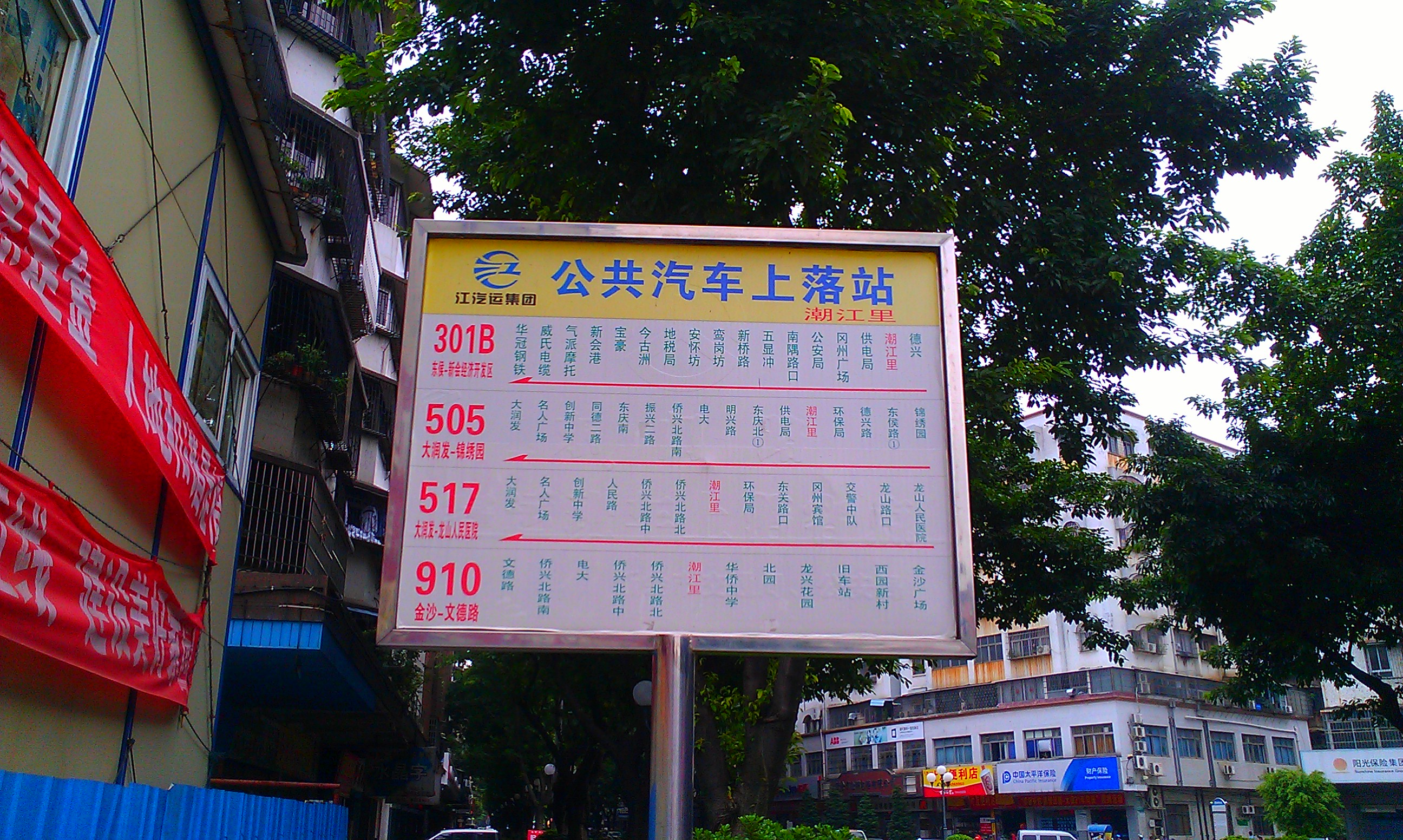 中文（香港）: 新會巴士站牌